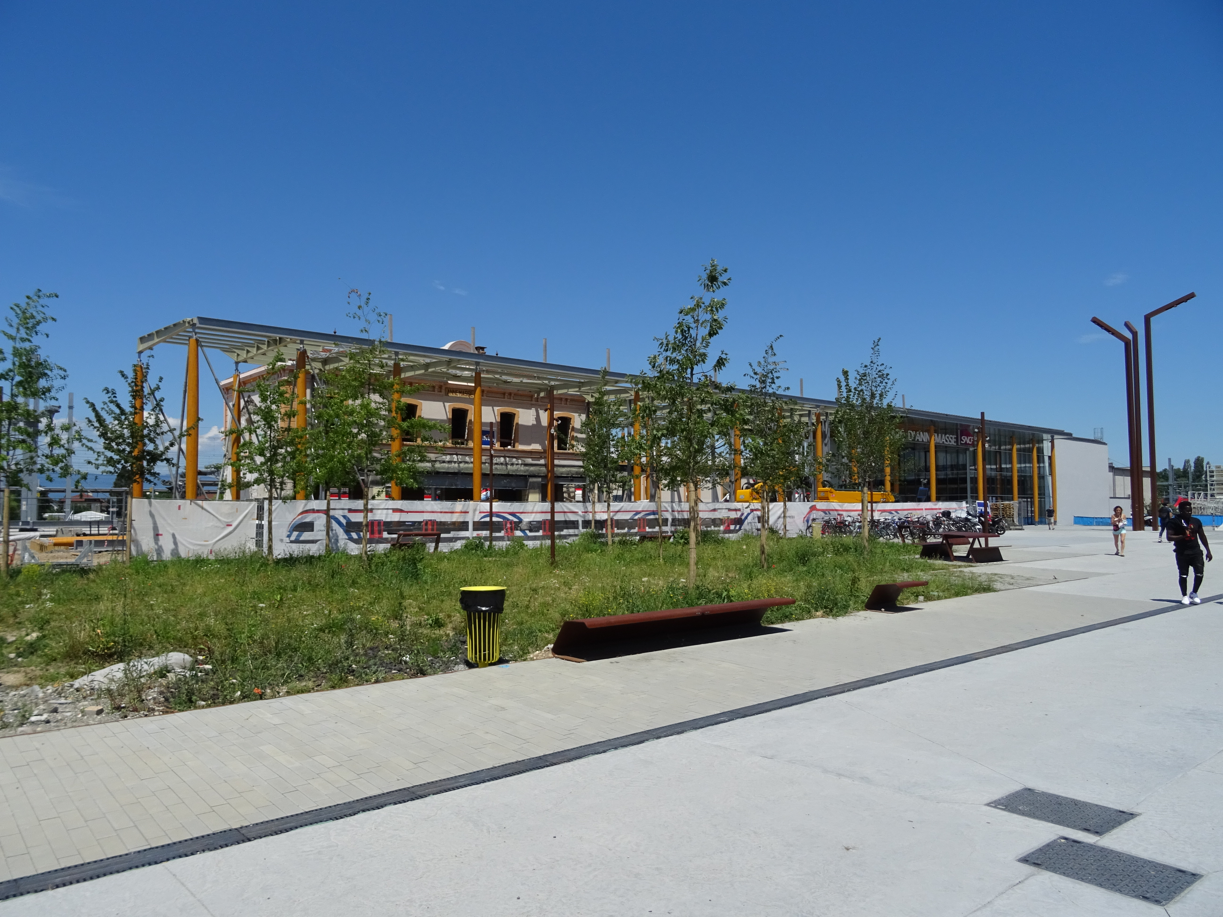 Vue générale des travaux du nouveau bâtiment voyageurs de la gare d'Annemasse.